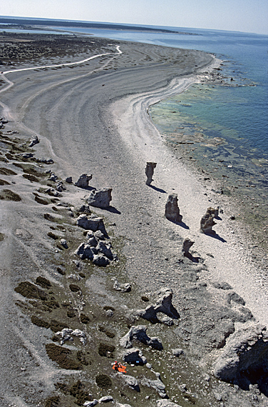 Raukarna på Langhammars är åtta till tio meter höga. Motiv: Langhammars raukfält Nyckelord: Flygbilder, Naturreservat, Riksintressen Kategori: Kust- och skärgårdsmiljö Raukarna på Langhammars är åtta till tio meter höga.